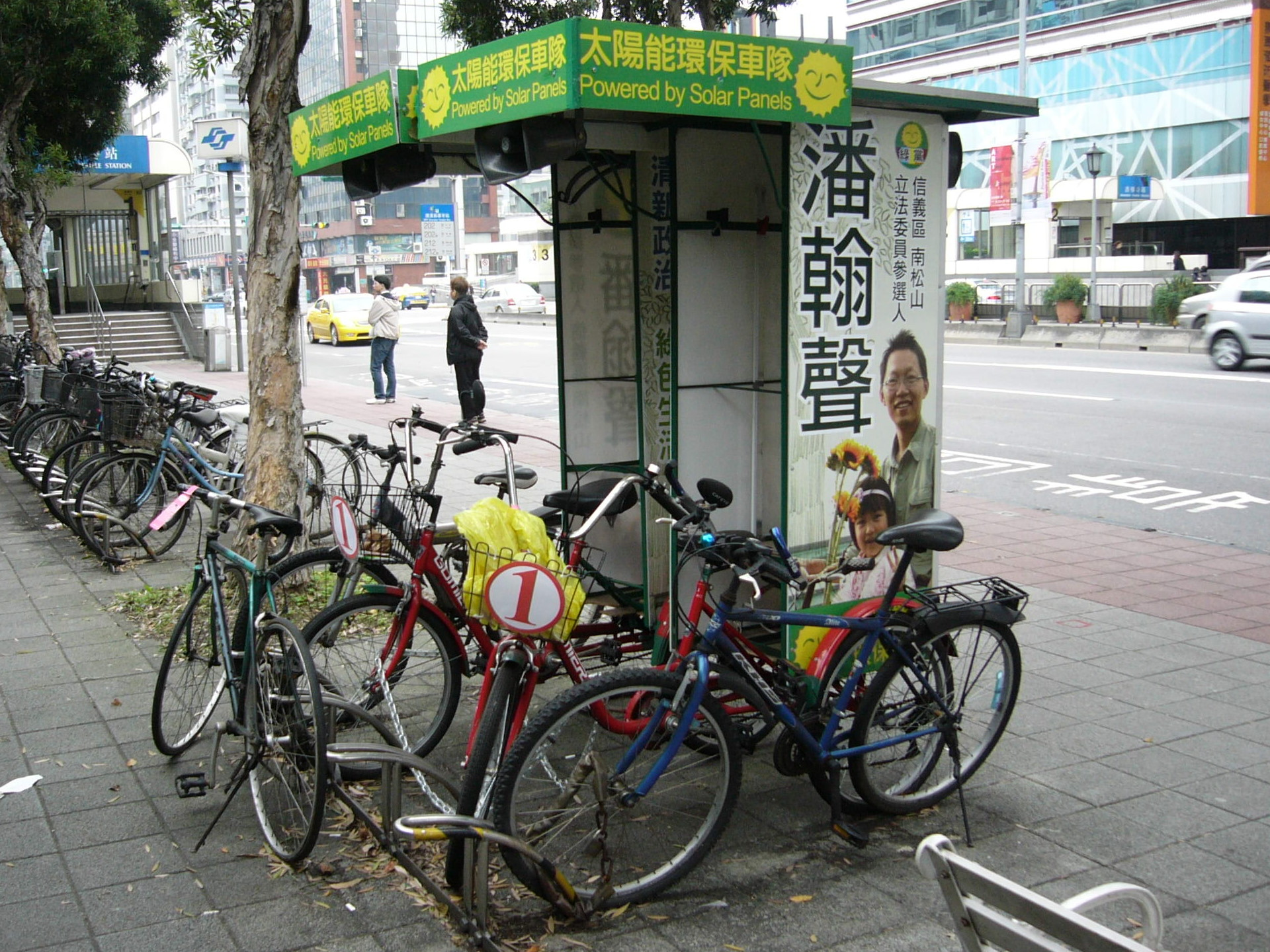 2012年中華民國立法委員選舉，台灣綠黨提名的台北市第七選區（松山區、信義區）區域立法委員候選人潘翰聲的太陽能腳踏車隊，停放於台北市中正區忠孝東路一段台北捷運善導寺站1號出口前。